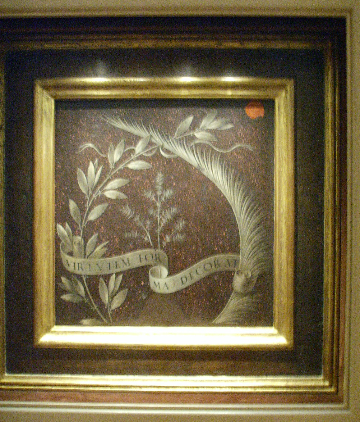 National gallery in washington d.c., leonardo da vinci, verso del ritratto di ginevra de' benci